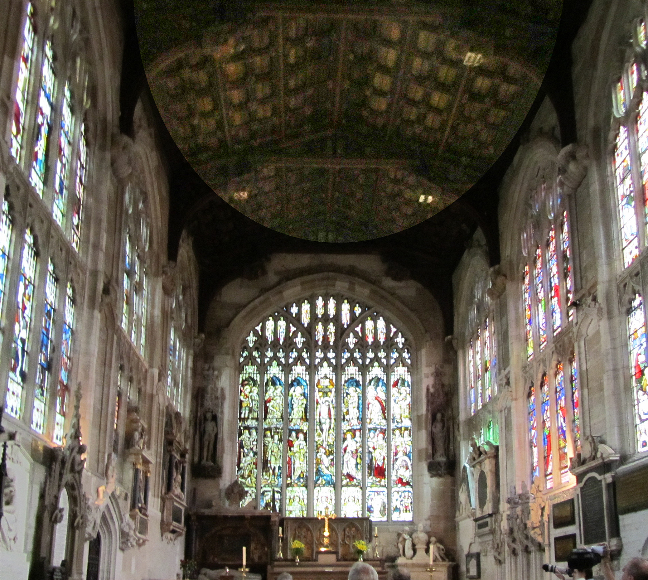 Church of the Holy Trinity, Stratford-upon-Avon ; das Grab von William Shakespeare